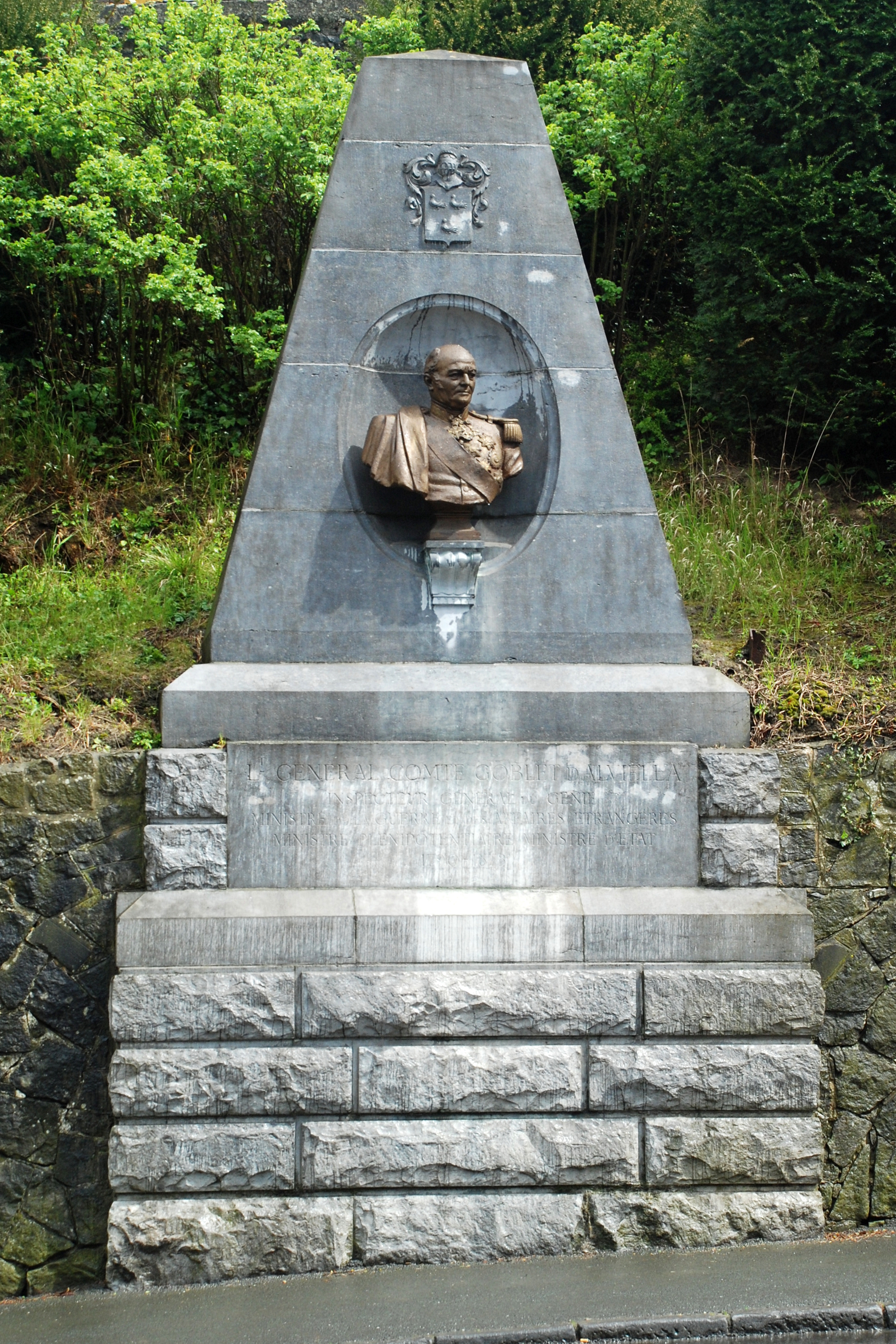 Belgique - Brabant wallon - Court-Saint-Etienne - Monument au comte Goblet d'Alviella